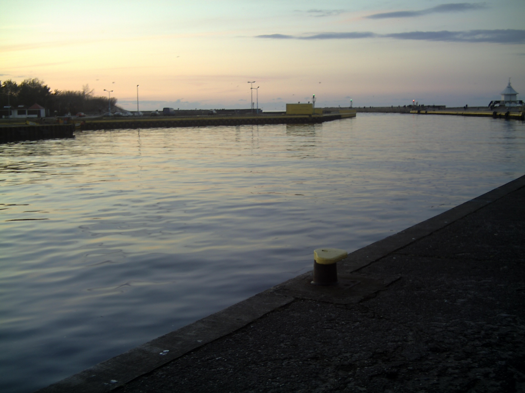 Harbour in Ustka